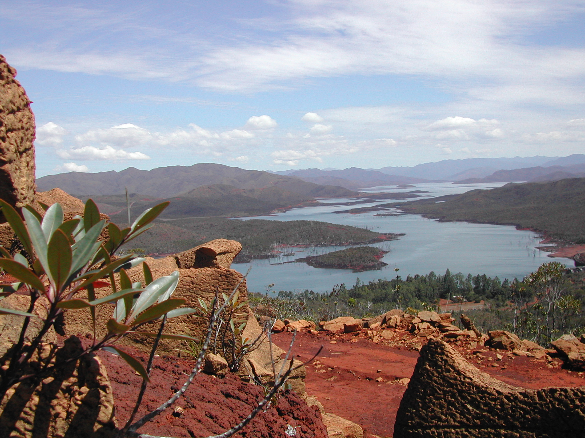 Lac de Yaté